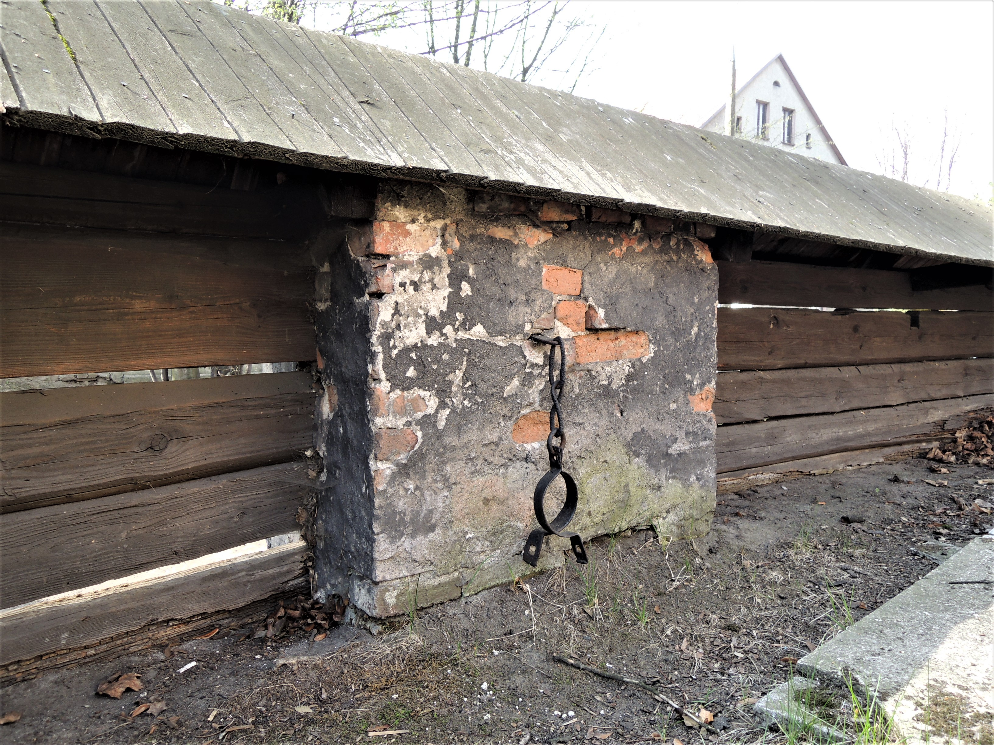 Stary cmentarz przy kościele św. Marii Magdaleny w Bełku - kuna przy ogrodzeniu